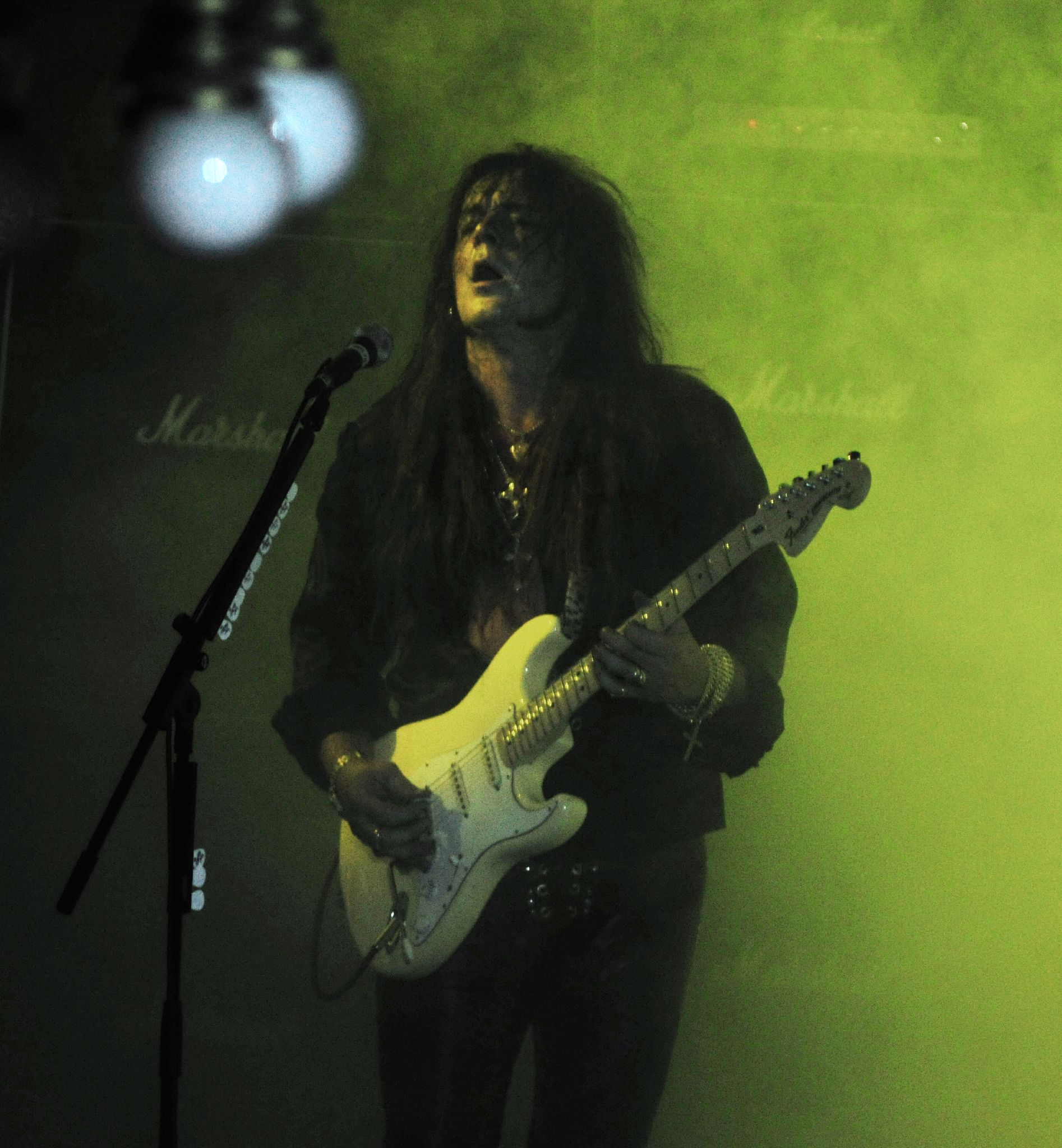 Concierto de Yngwie Malmsteen en la sala Apolo de Barcelona